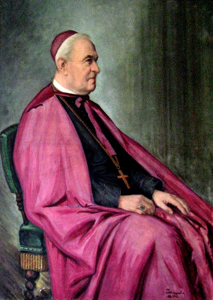 Gyula Meszlényi 1832-1905, Bishop of Satu Mare 1887-1905